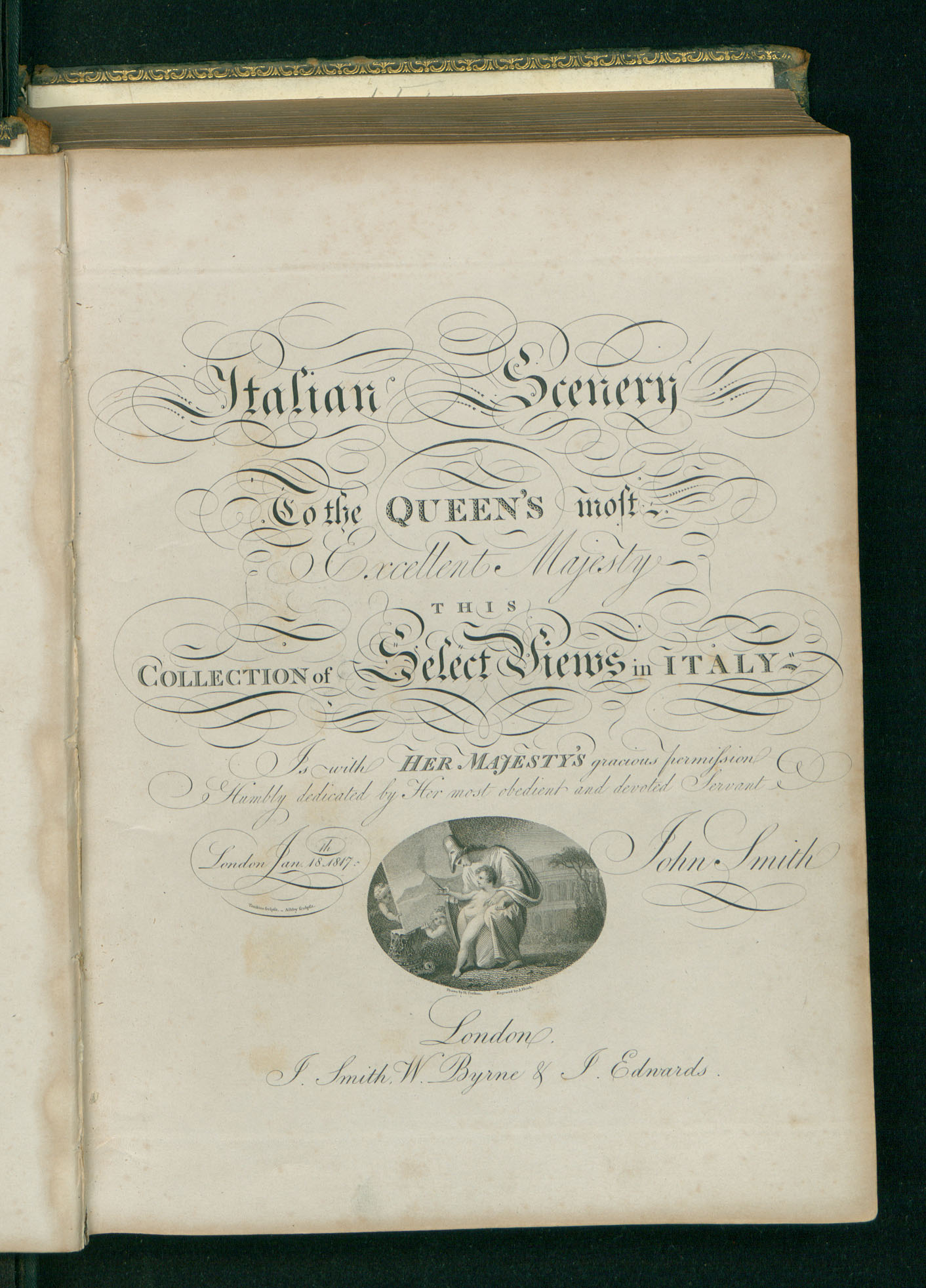 Frontespizio